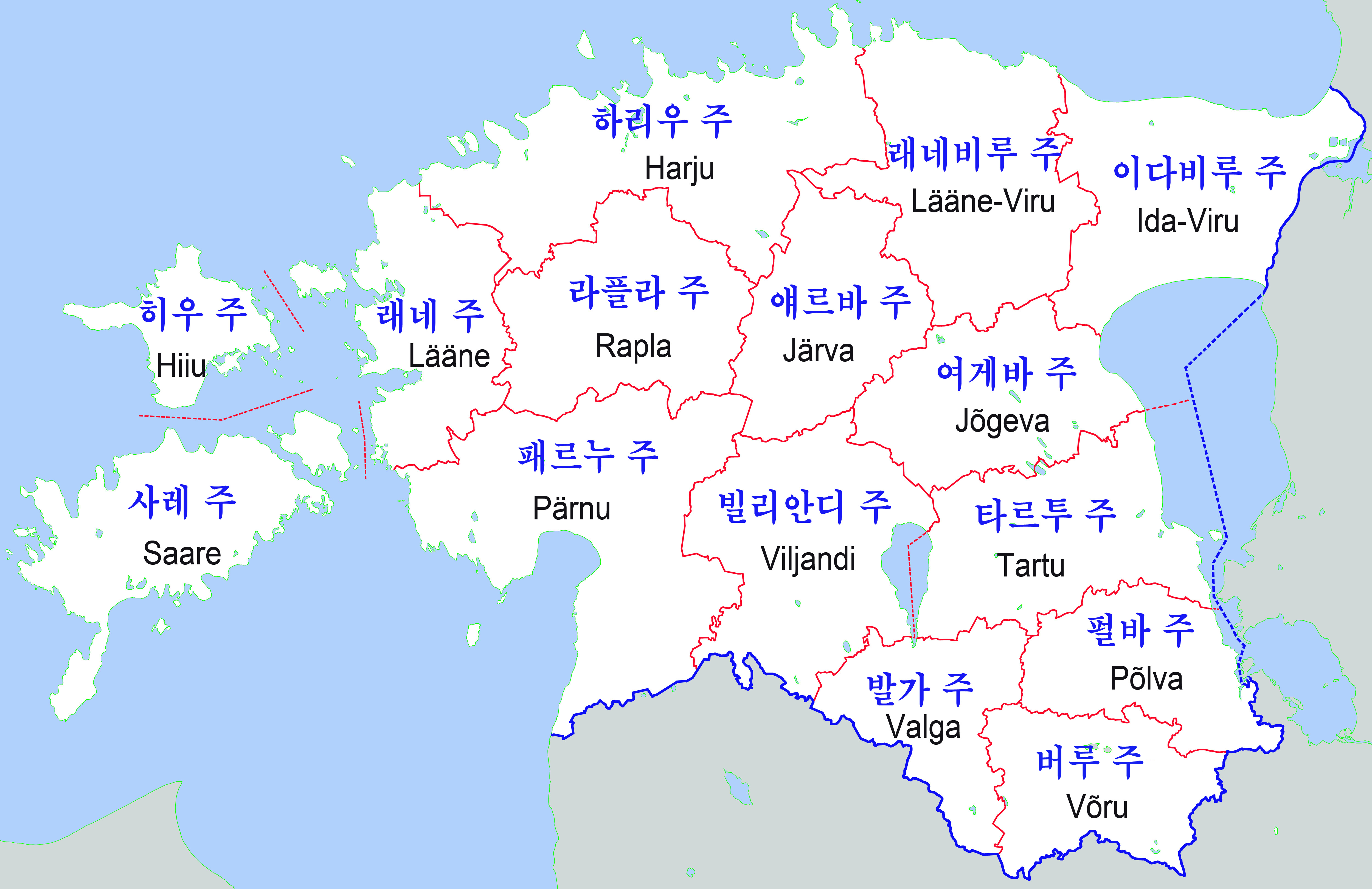 에스토니아 행정구역